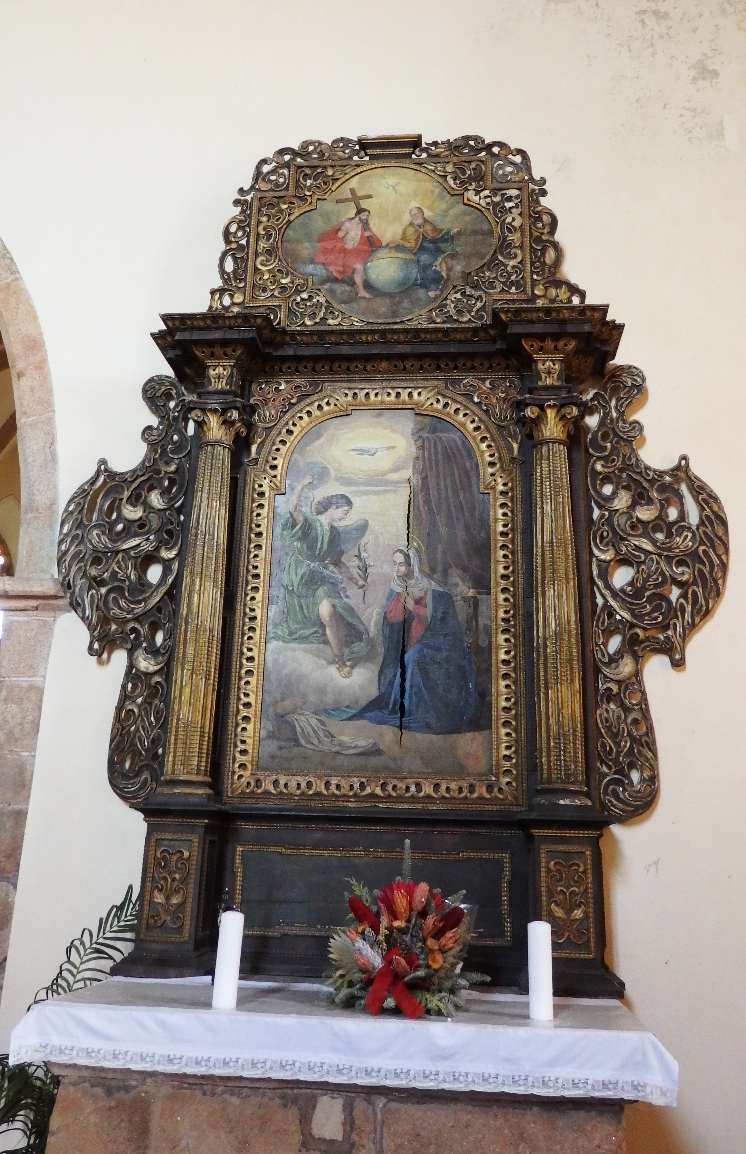 Kostel U Svatých v Domažlicích, oltář Zvěstování Panny Marie